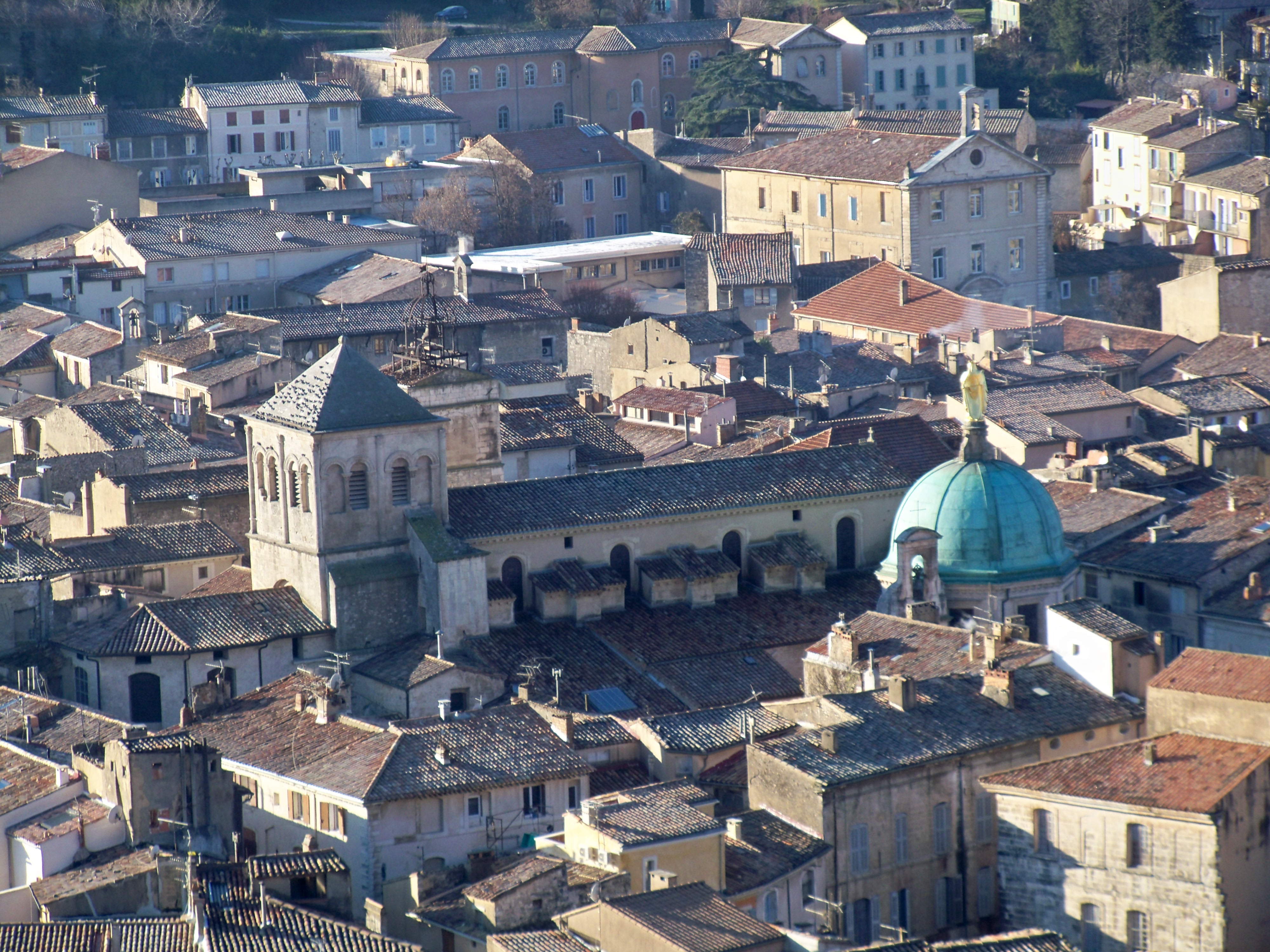 Vue sur la Cathédrale Sainte Anne d'Apt, Vaucluse, France